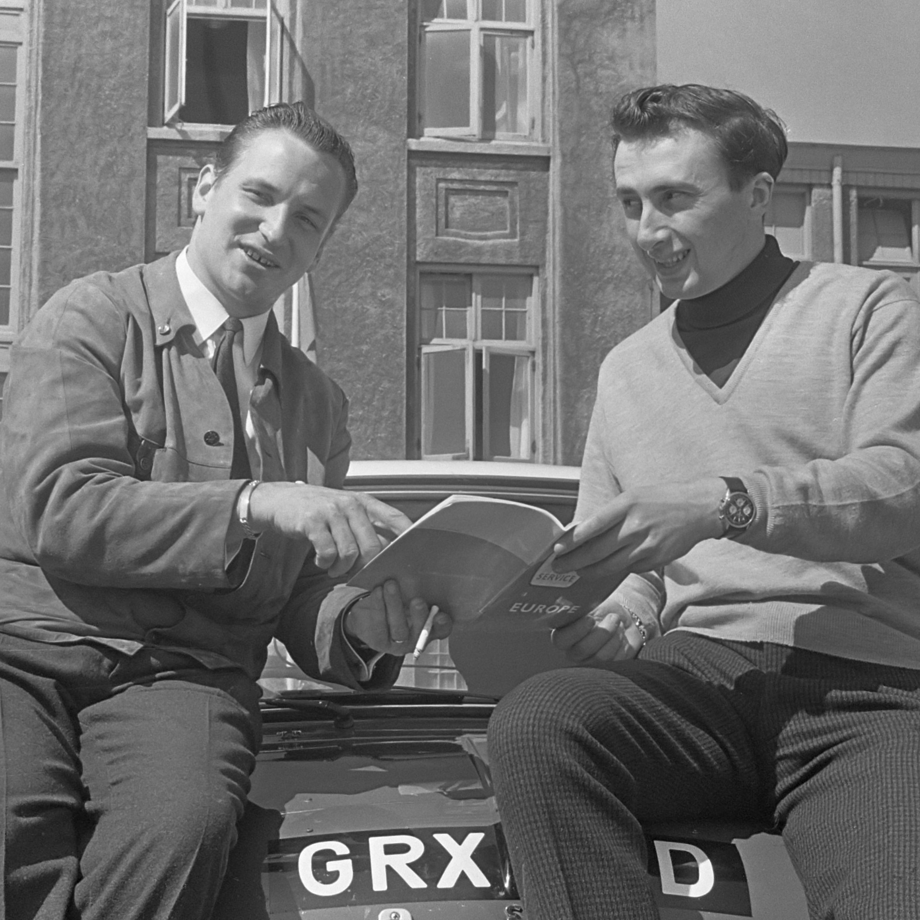 Voorbereidingen Tulpenrallye, Timo Makinen (links), Paul Easter(rechts) met BMC Cooper 25 april 1966